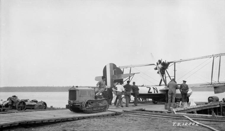 A020389 Cletrac